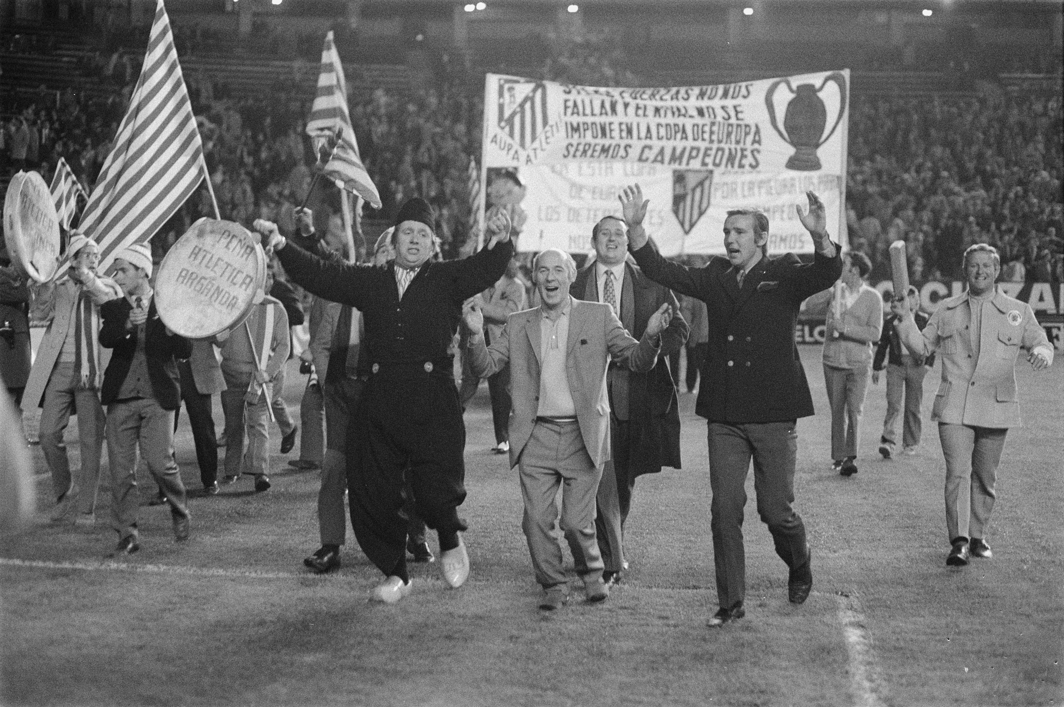 Voetbalwedstrijd Europacup 1 halve finale, Atletico Madrid - Ajax: 1-0